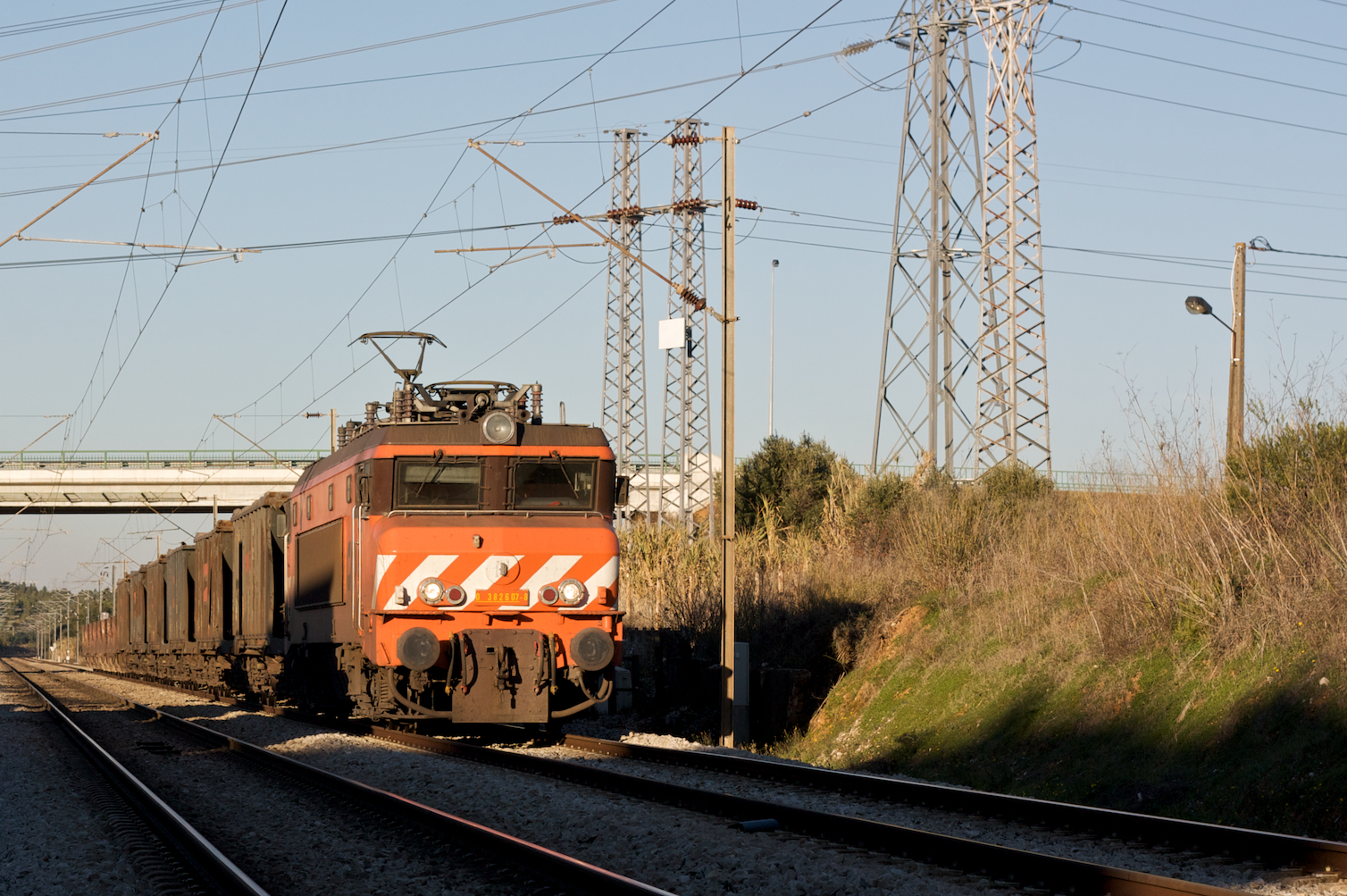 Tipo: Comboio de Transporte de Areia 62330 (material vazio) [Vila Nova de Gaia - Entroncamento] Local: Entroncamento [Linha do Norte, PK 107] Data e hora: 20 de Dezembro de 2008 [15h53] Material: Locomotiva 2607 + 10 vagões (6 CP Falls e 4 CP Us)